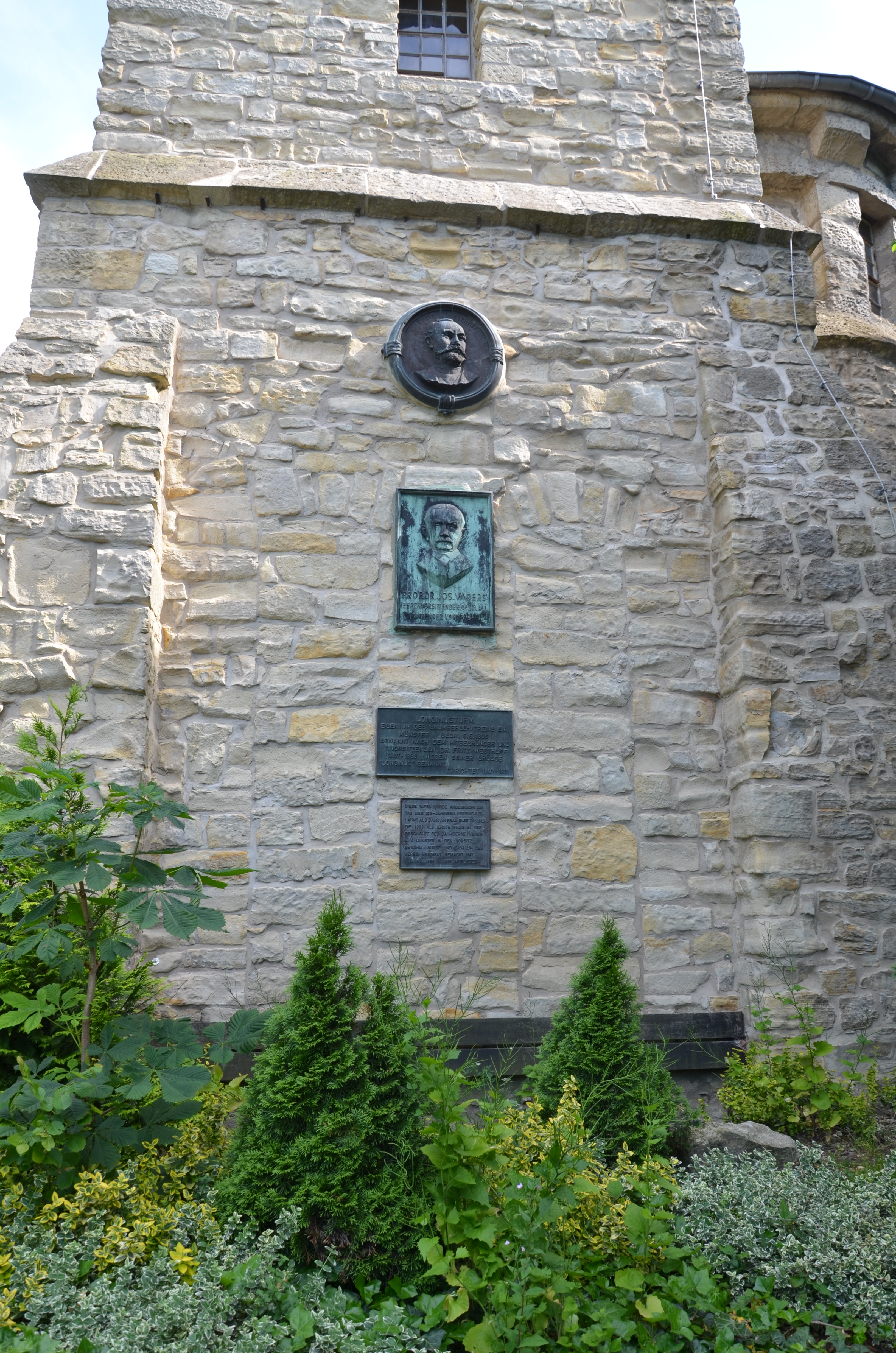 Longinusturm auf dem Westerberg in den Baumbergen im Münsterland verschiedene Plaketten an der Frontseite des Turms